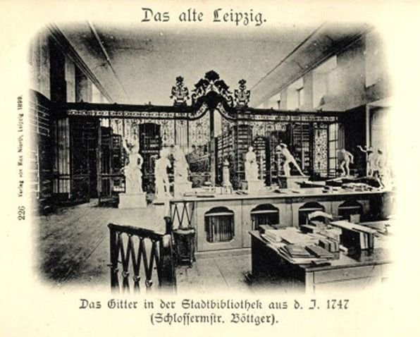 Historische Ansicht in der Leipziger Stadtbibliothek